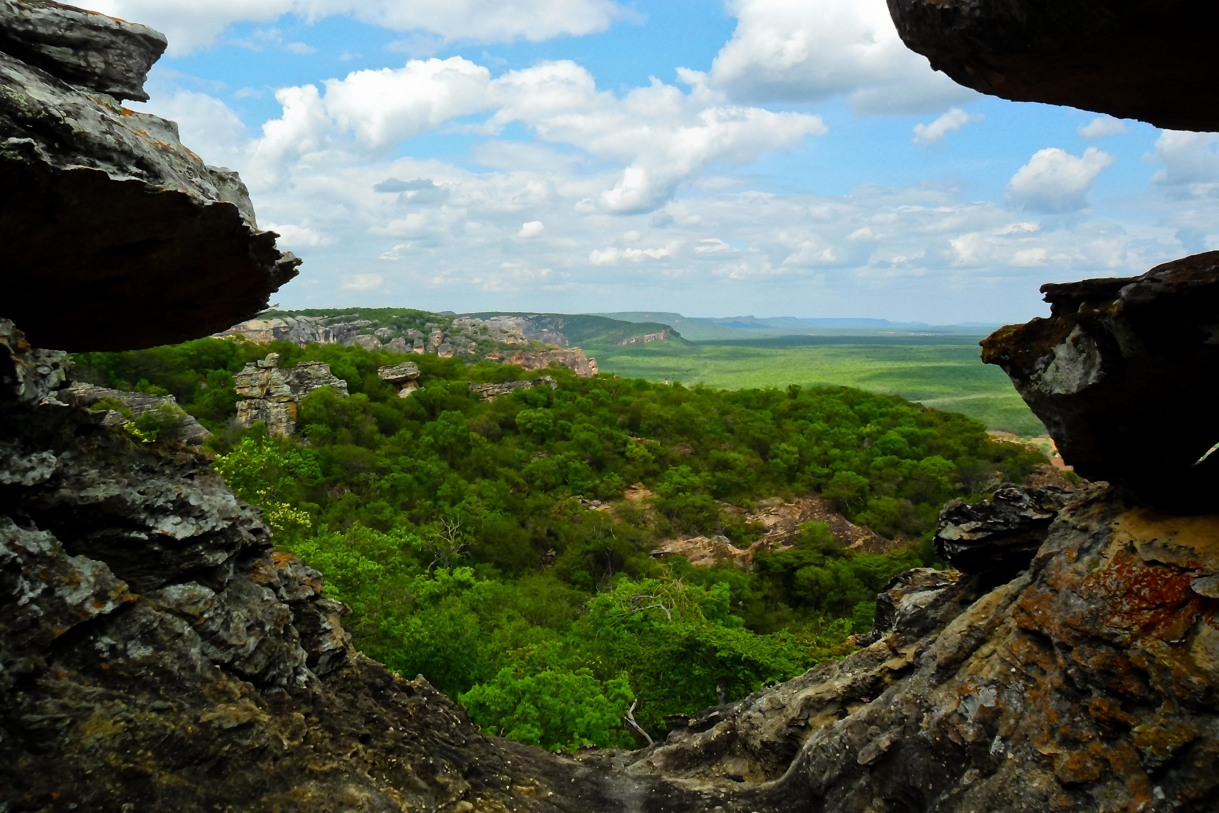 Insira_uma_descrição_para_sua_foto